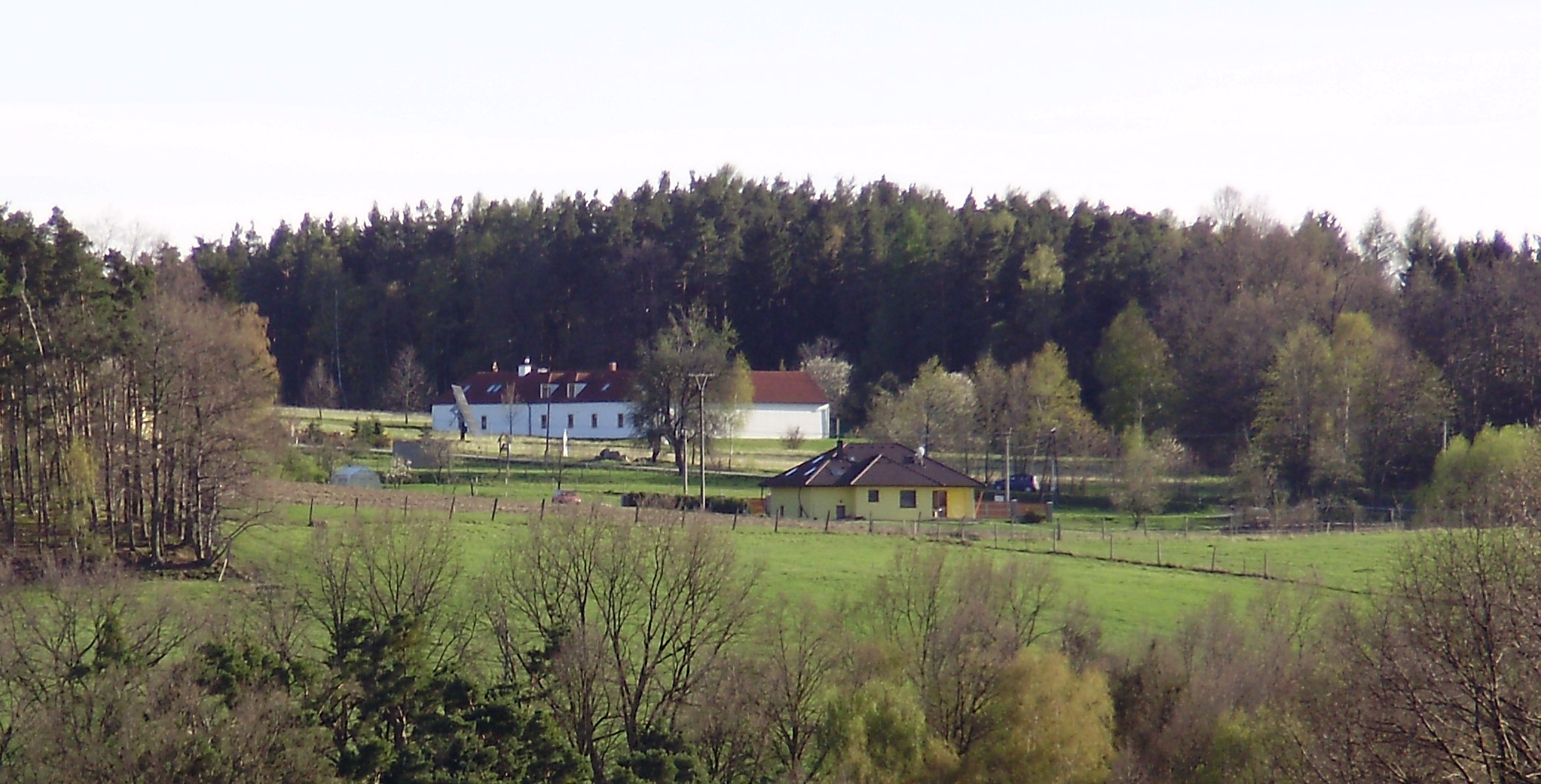 Bukovec, osada náležící k obci Kamenný Újezd